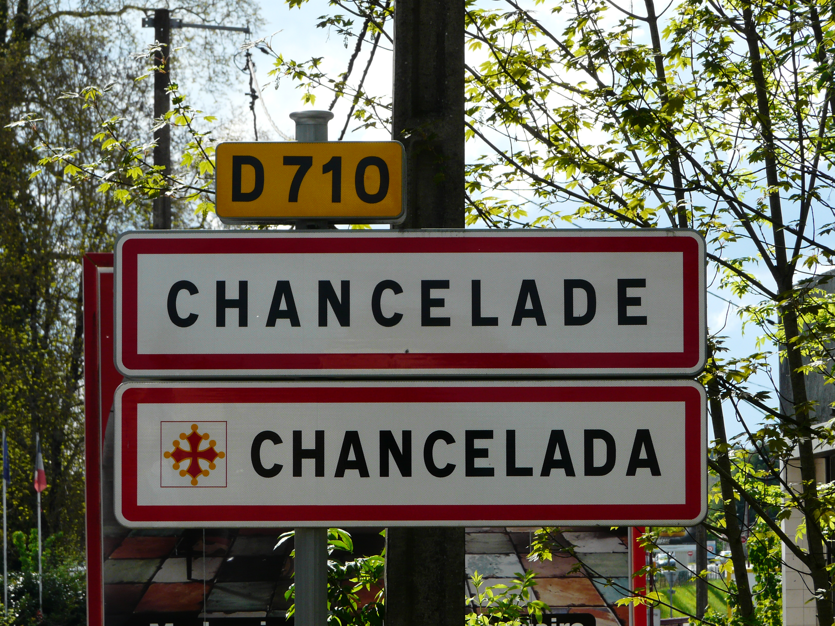 Sur la route départementale 710, panneau bilingue français-occitan d'entrée dans Chancelade, Dordogne, France.